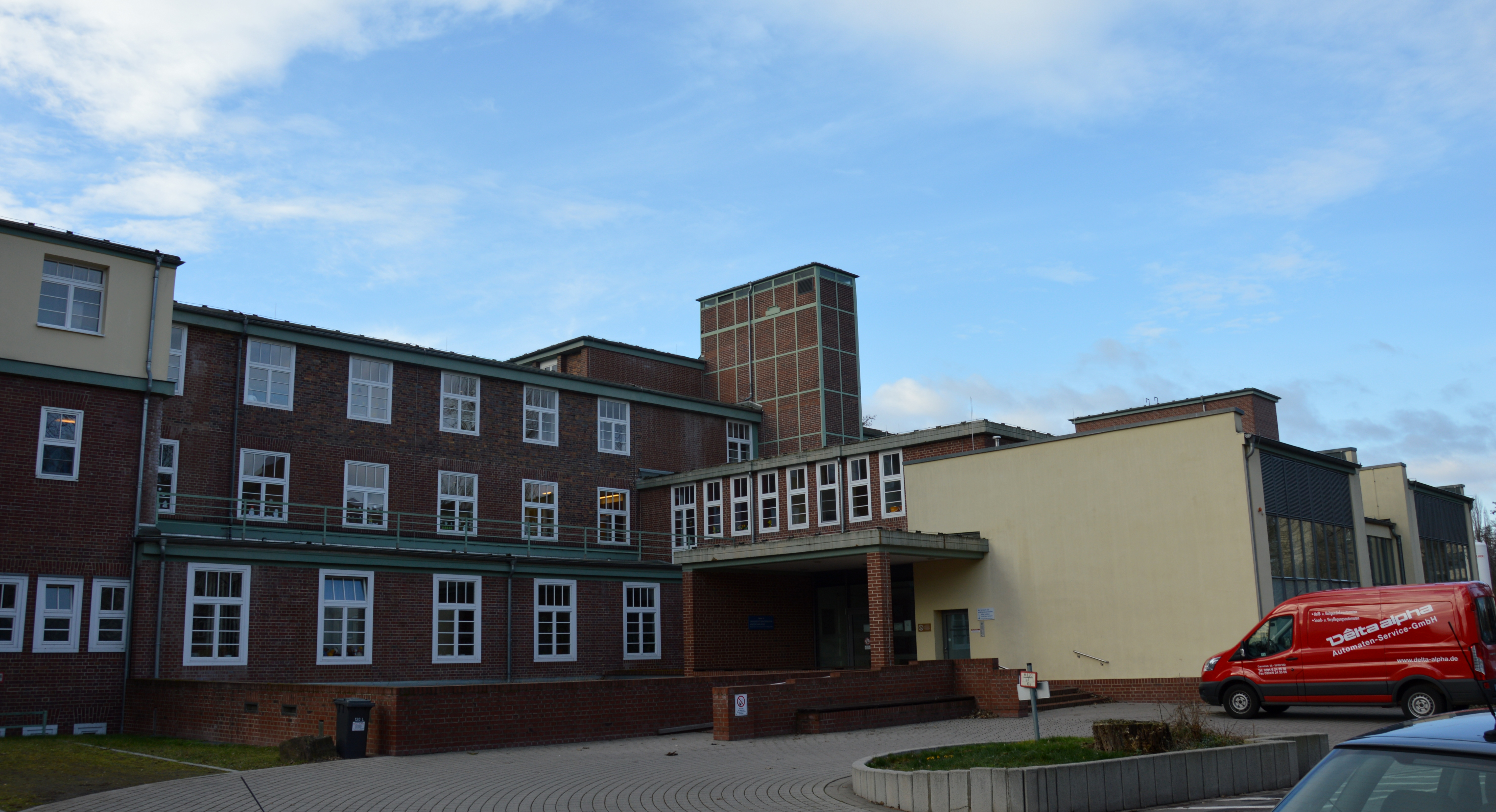 Uniklinikum Magdeburg Gebäude 10